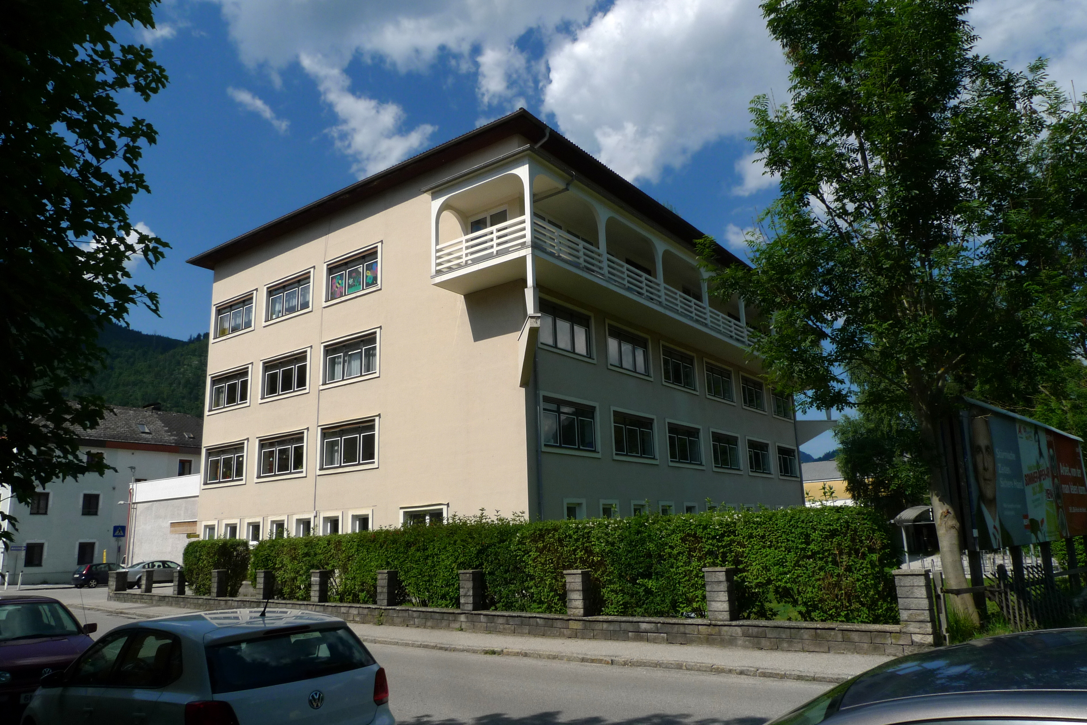 Hauptschule